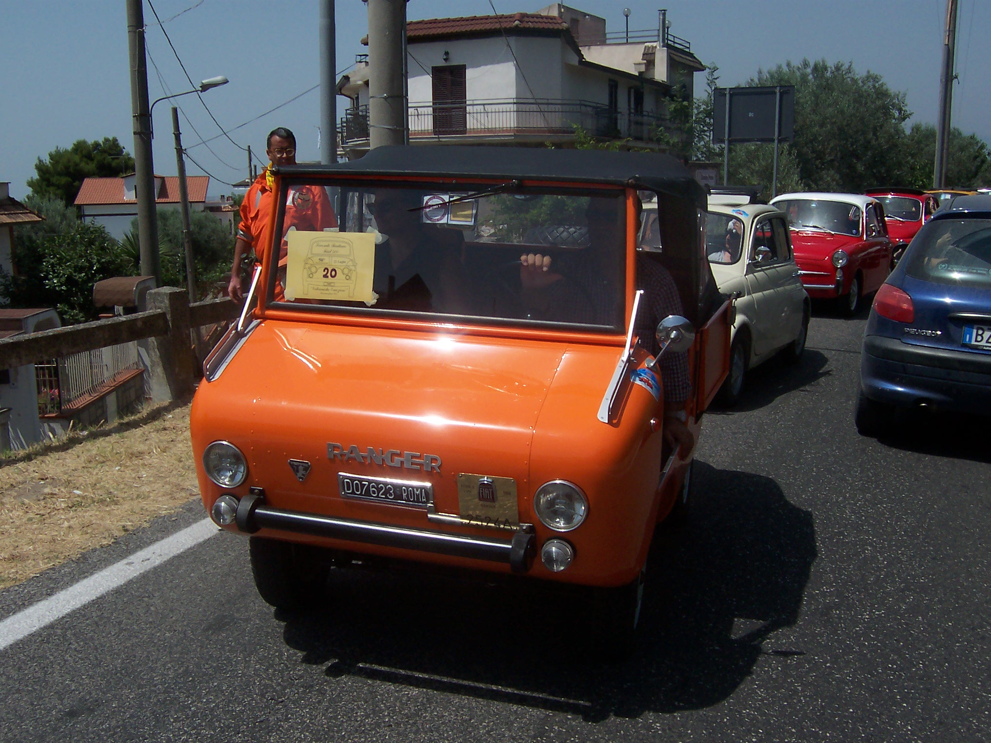 raduno auto d'epoca